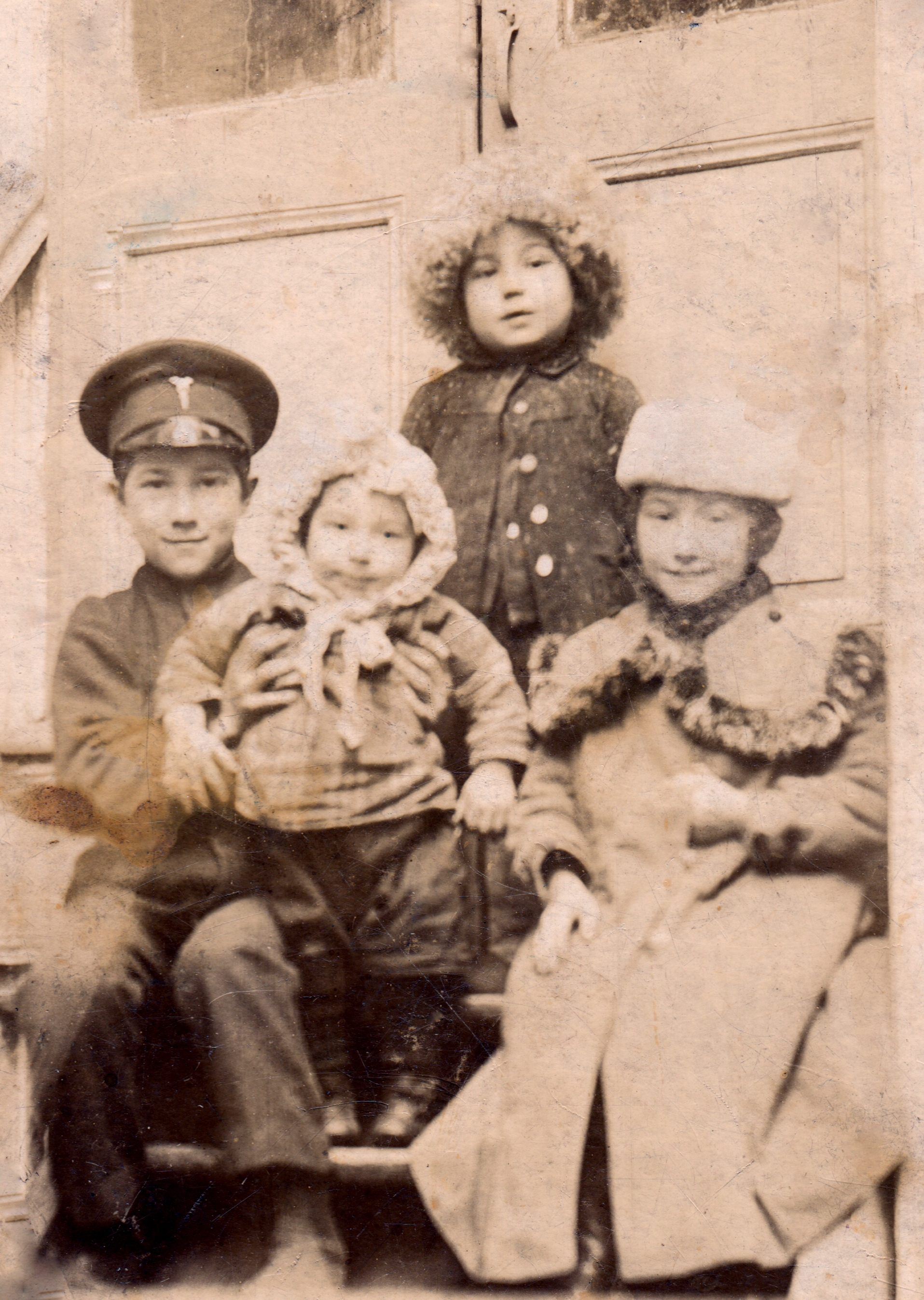 Дети Иова Георгиевича Хомизури и Марфы Дмитриевны Качаевой. Пётр (1897-1937), Николай (1907-1991), Павел (1903-1968), Анна (1900-?)